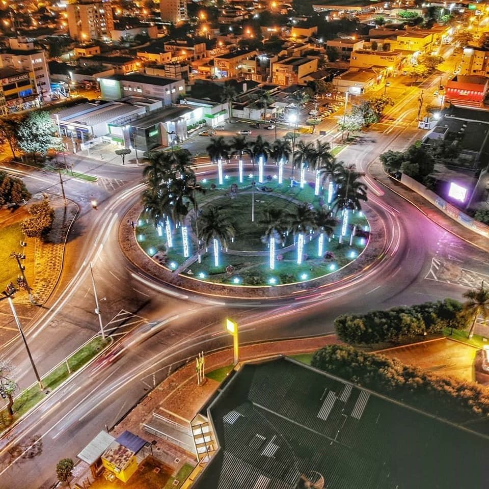 Love Tangara